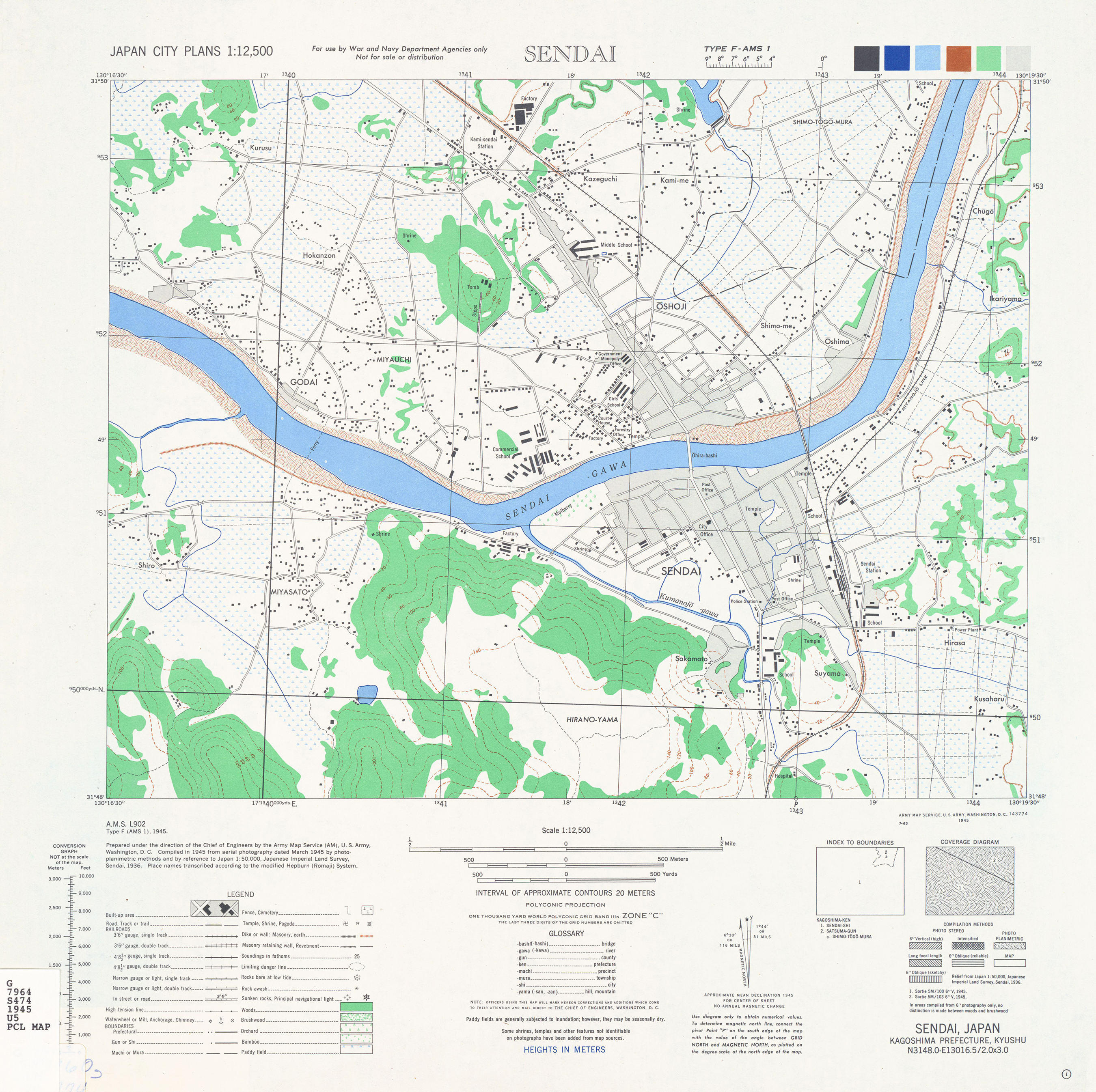 1946年ごろの鹿児島県川内市の地図